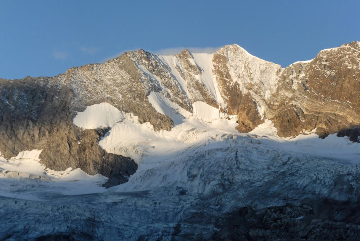 Hochfeilernordwand, Alps